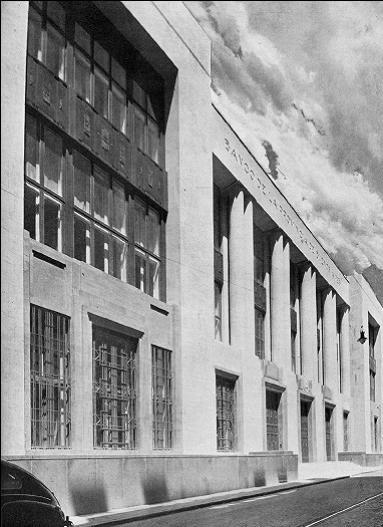 Fachada sobre la calle San Martín de la primera etapa construida de la casa central del Banco de la Provincia de Buenos Aires. Calles San Martín y Bartolomé Mitre.